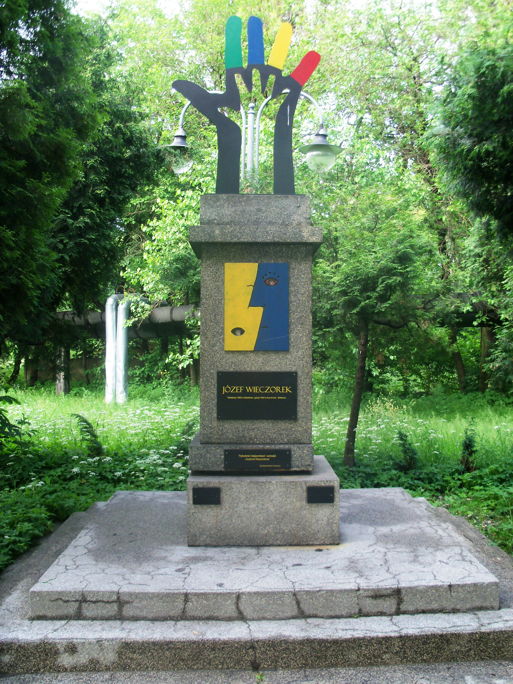 Pomnik ku czci Józefa Wieczorka w Katowicach-Nikiszowcu